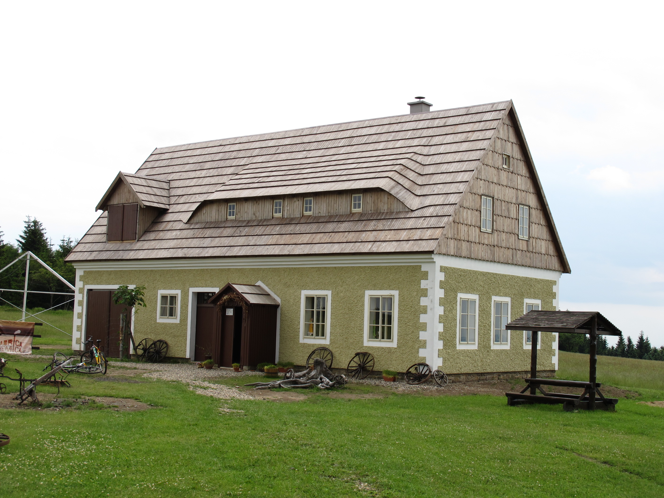 Muzeum v Lesné